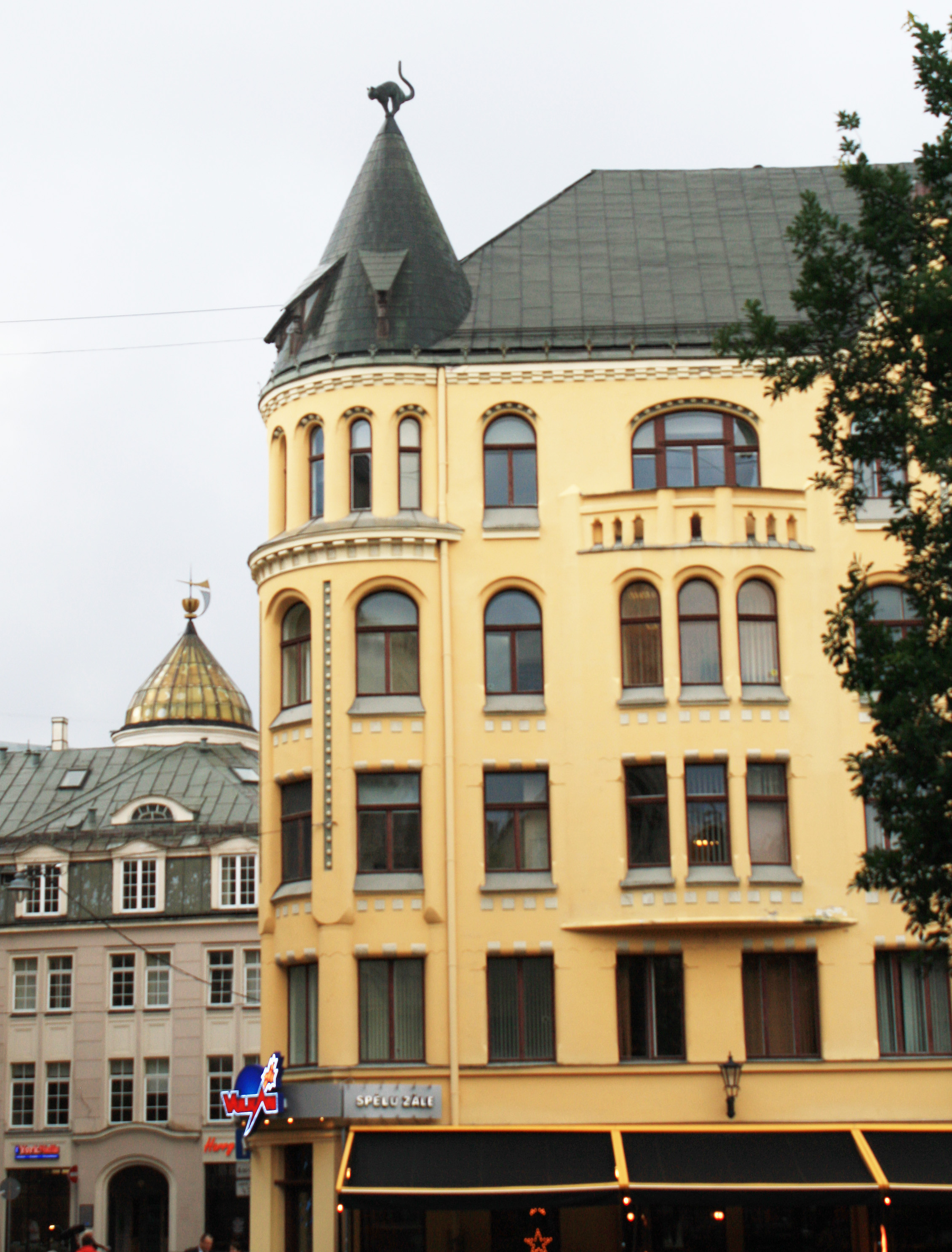 Рига (Латвия) Старый город "Дом с кошкой"